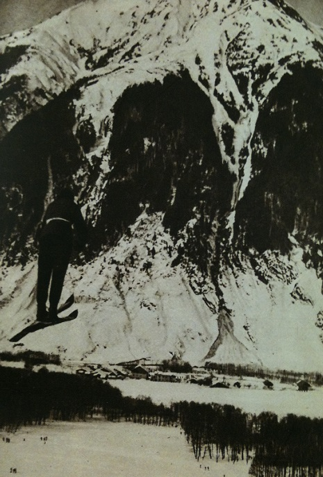 Sulo Jääskeläinen à chamonix en 1924